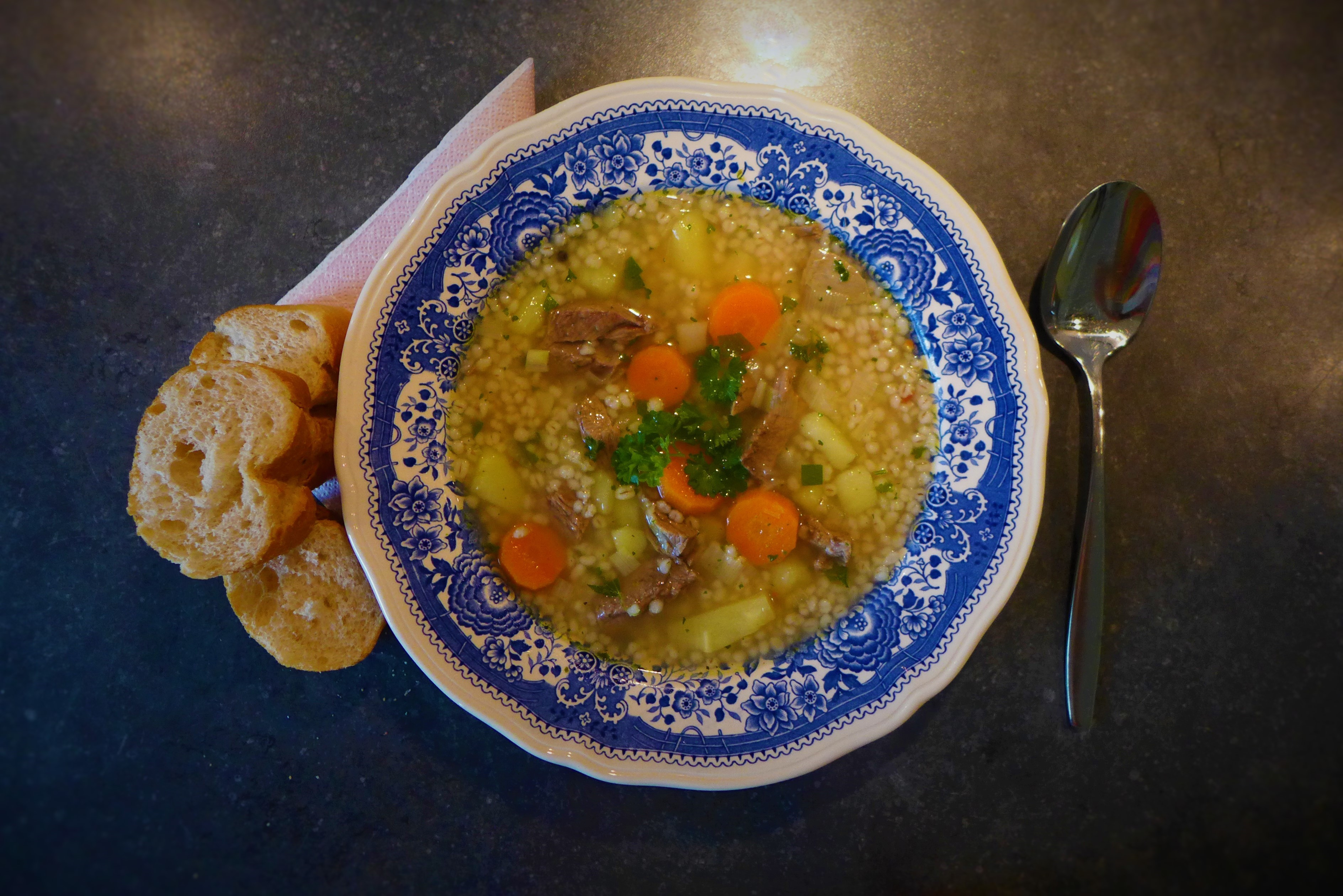 Gerstengraupensuppe mit Rindfleischeinlagen, Kartoffeln und Suppengemüse